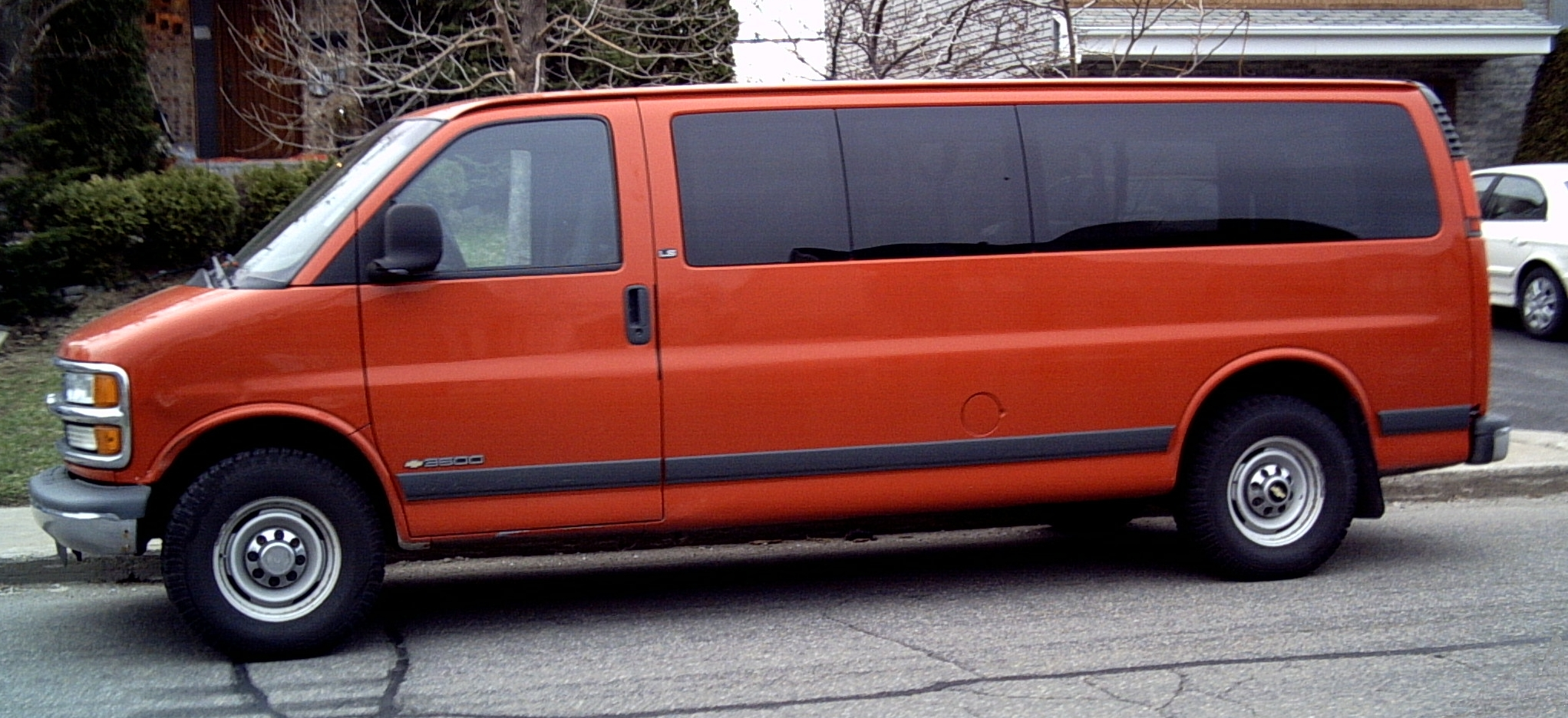 Chevrolet Express, aka GMC Savana